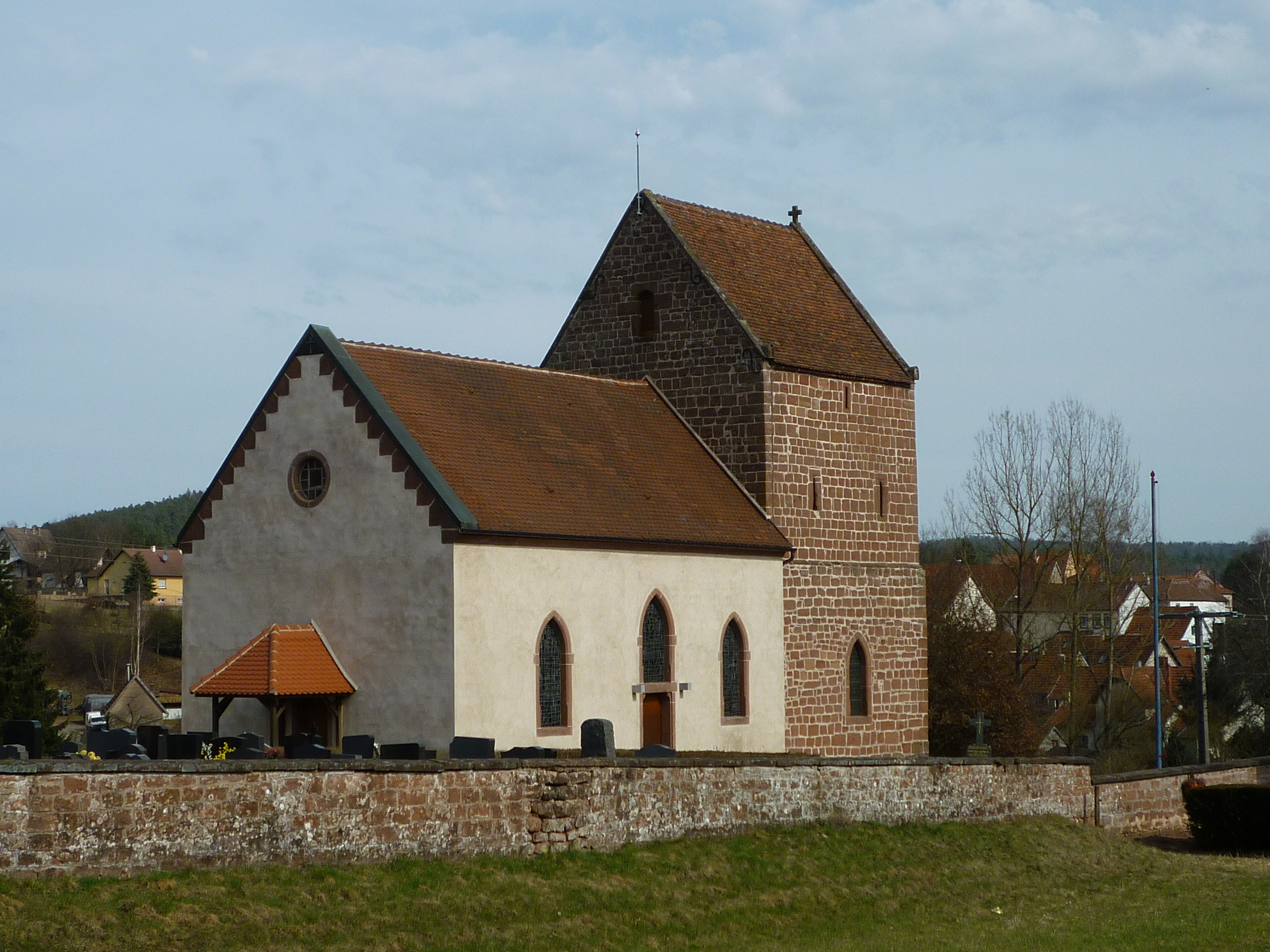 Église protestanteéglise (Inscrit) .